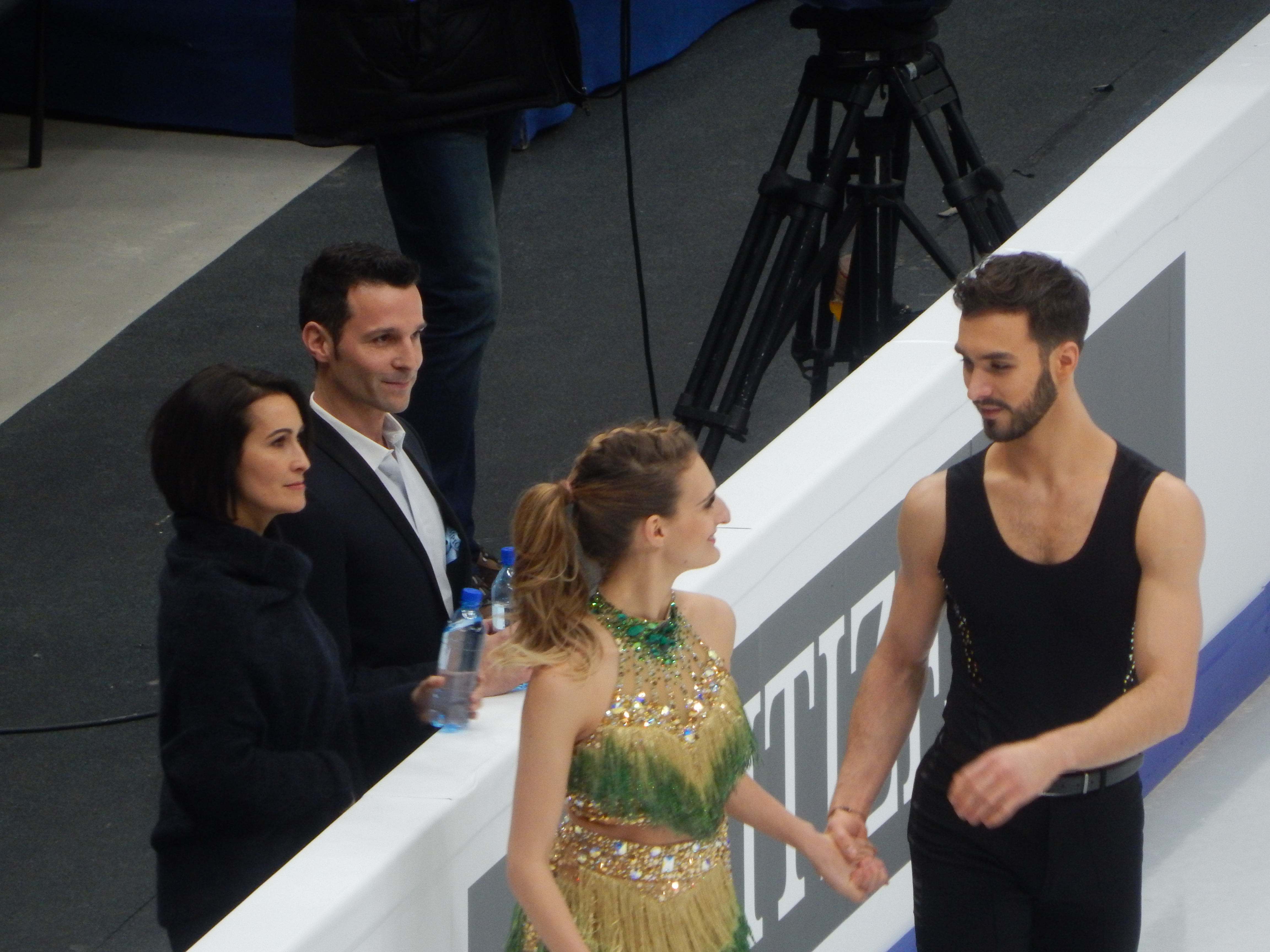 Чемпионат Европы по фигурному катанию 2018 в Москве. Третий день соревнований (19 января). Французская пара из Франции, победители в коротком танце, Габриэлла Пападакис и Гийом Сизерон